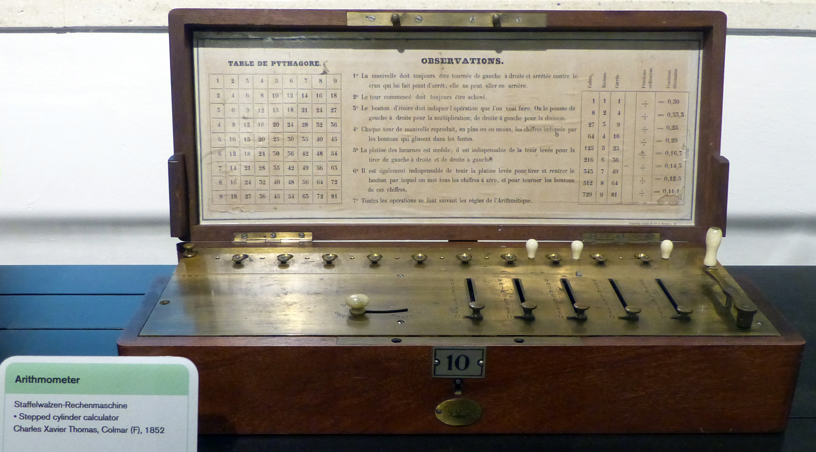 Arithmometer (Staffelwalzen-Rechenmaschine) von Charles Xavier Thomas, Colmar, 1852; Exponat im Technischen Museum Wien